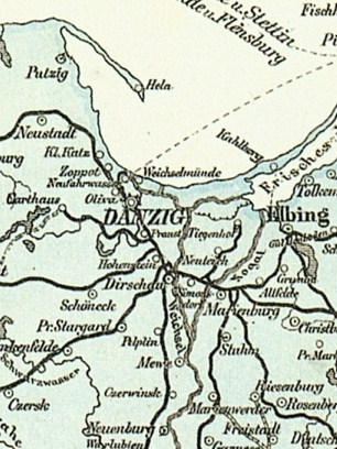 Linie kolejowe wokół Gdańska na niemieckiej mapie z 1899. Kartuzy (Carthaus), Pszczółki (Hohenstein), Skarszewy (Schöneck), Tczew (Dirschau), Wejherowo (Neustadt).